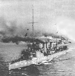 Torpedovene S2